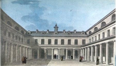 Voici la Etant donné que le lycée condorcet n'a été appelé lycée bonaparte qu'entre (1805 – 1814) et (1848-1870), et que nous savons que ce tableau a été fait dans cette période, nous pouvons supposer que son auteur soit mort avant 1936 (2006-70). Et que cette image est donc libre de droits.